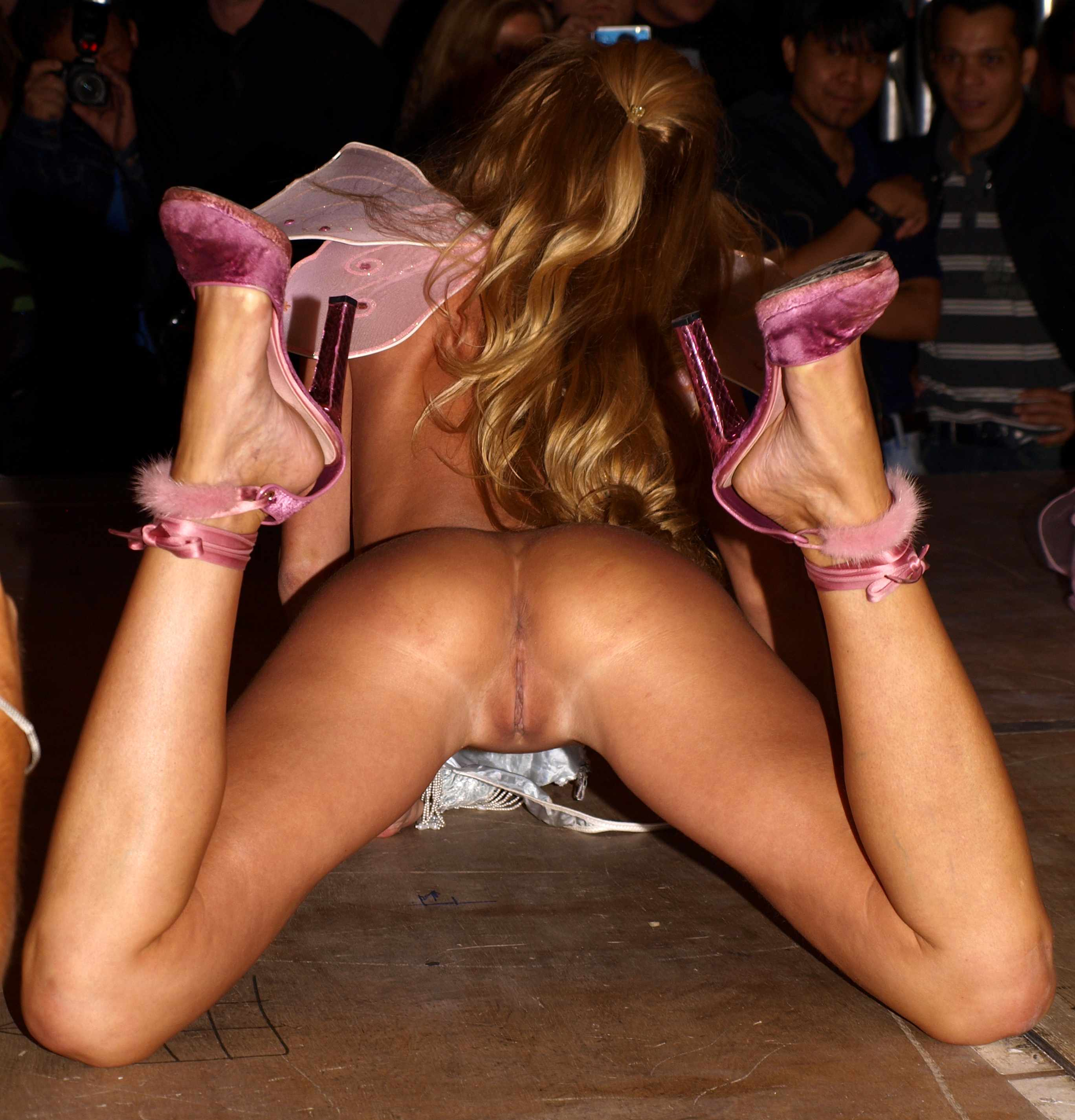 Gilda Roberts @ Salon Mutzenbacher 2010.